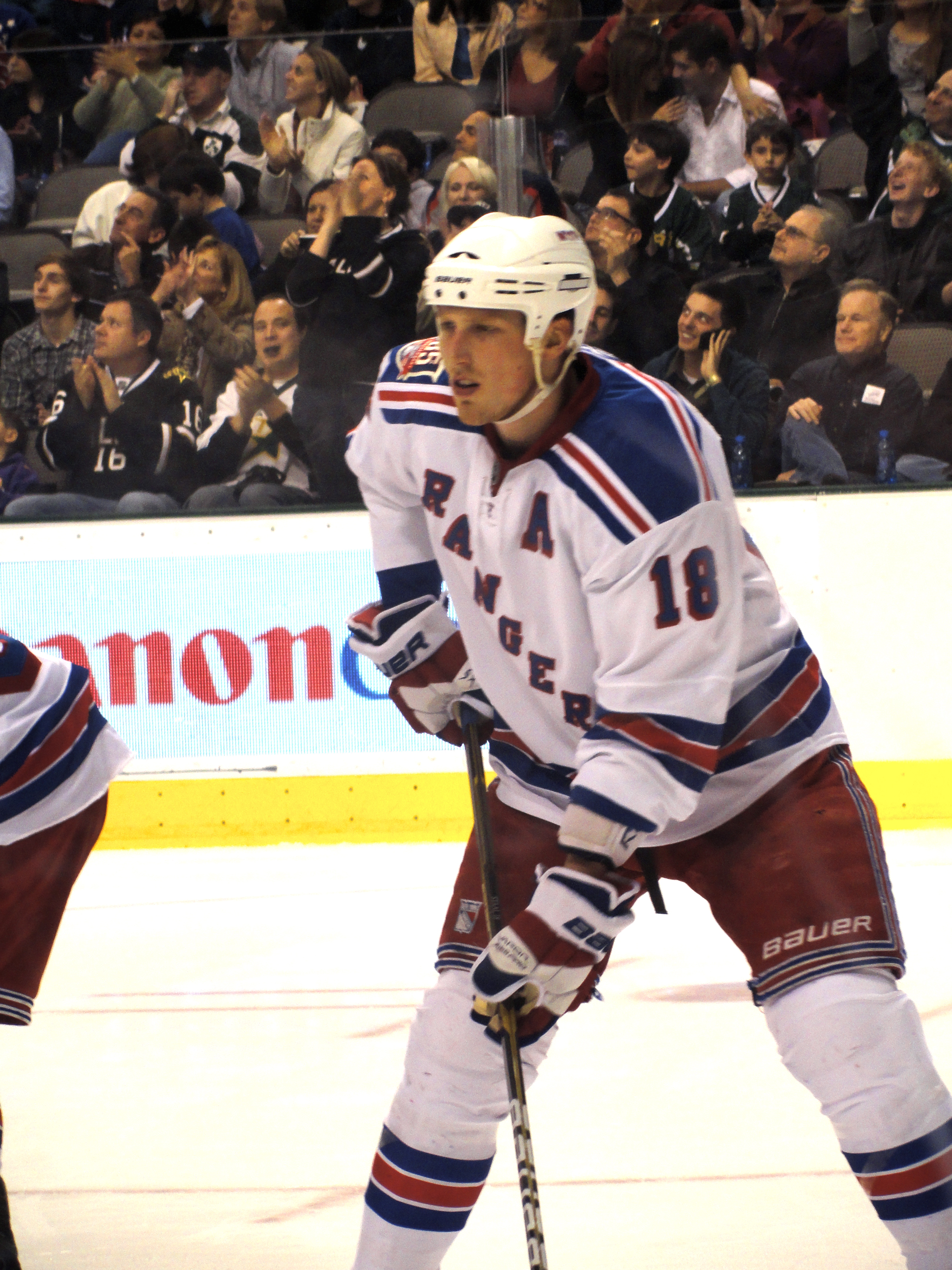 Marc Staal